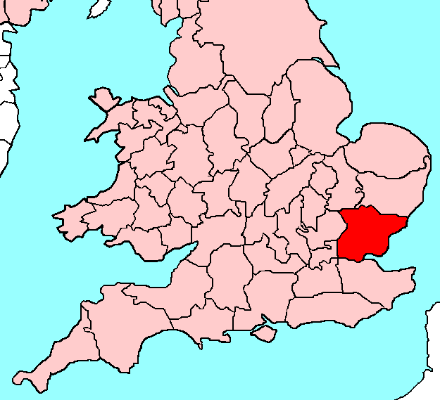 Essex